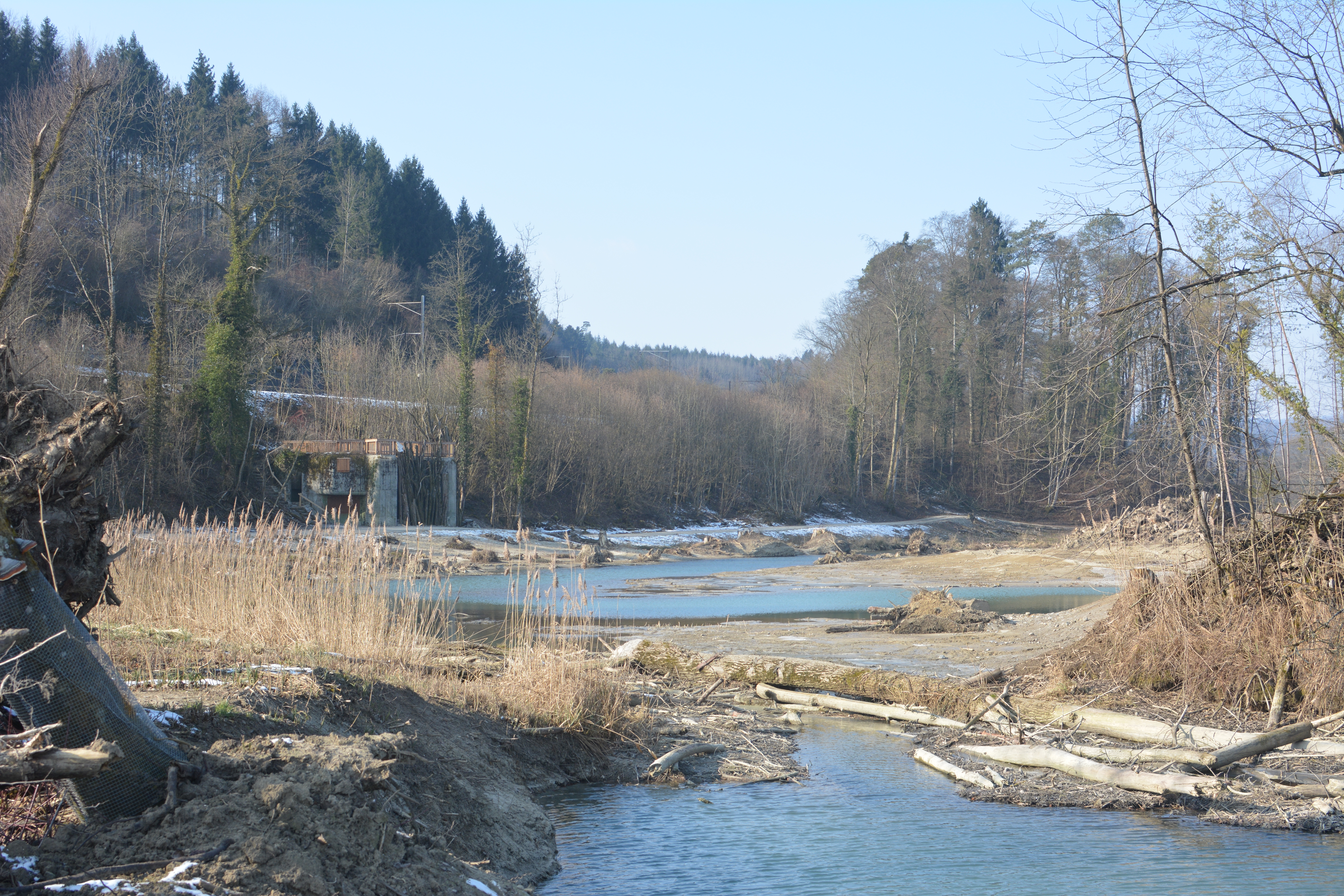 Der unterste Teil des im Rahmen des Auenrenturierungsprojekts "Chly Rhy" renaturierten Seitenarms des Rheins. Links ist der ehemalige Bunker mit der neu geschaffenen Beobachtungsplattform zu sehen